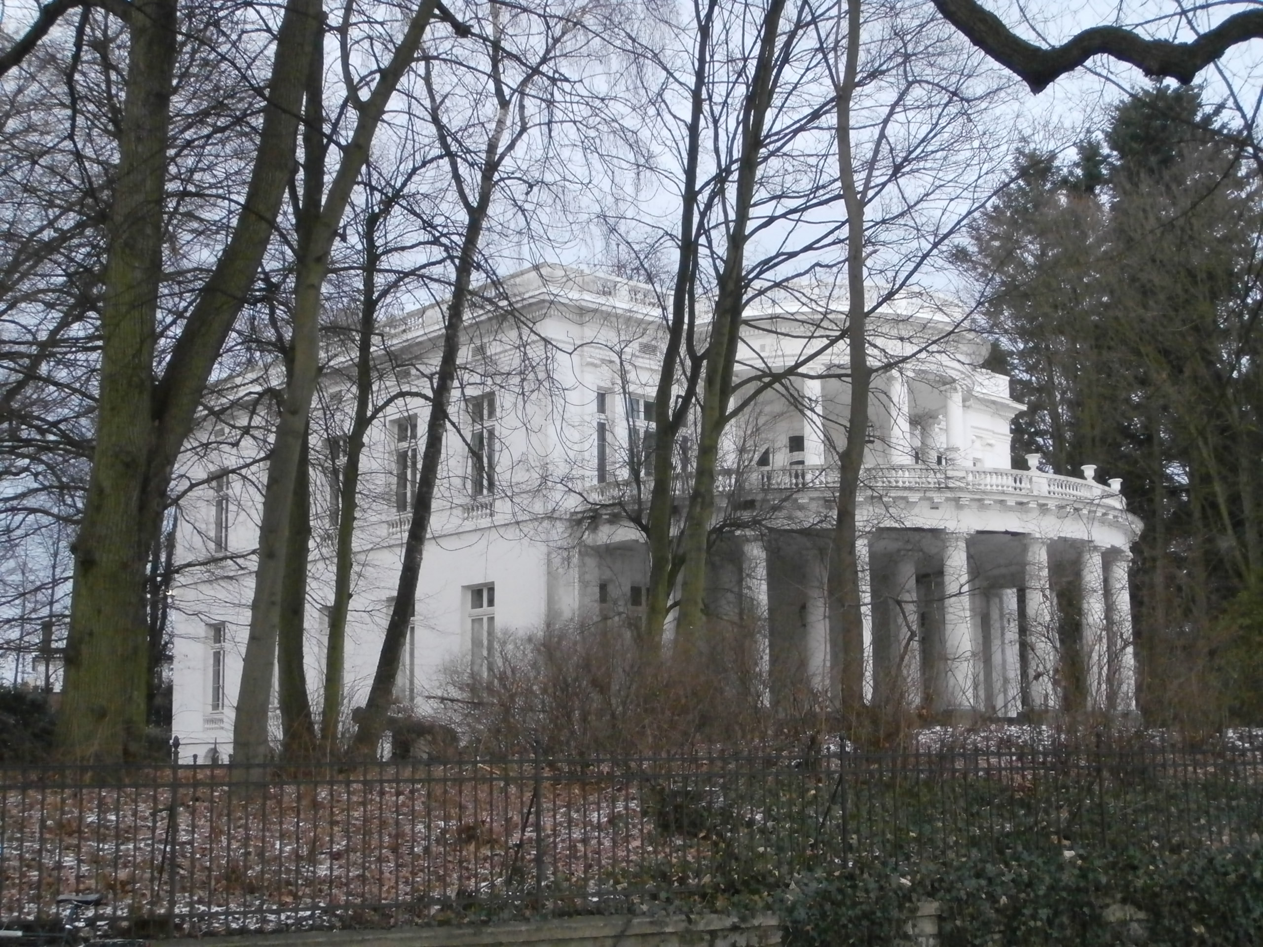 Zweigeschossiger großer Villenbau mit doppelter, im Halbkreis vorspringender Säulenloggia. Um 1820 von Axel Bundsen erbautThis is a photograph of an architectural monument.